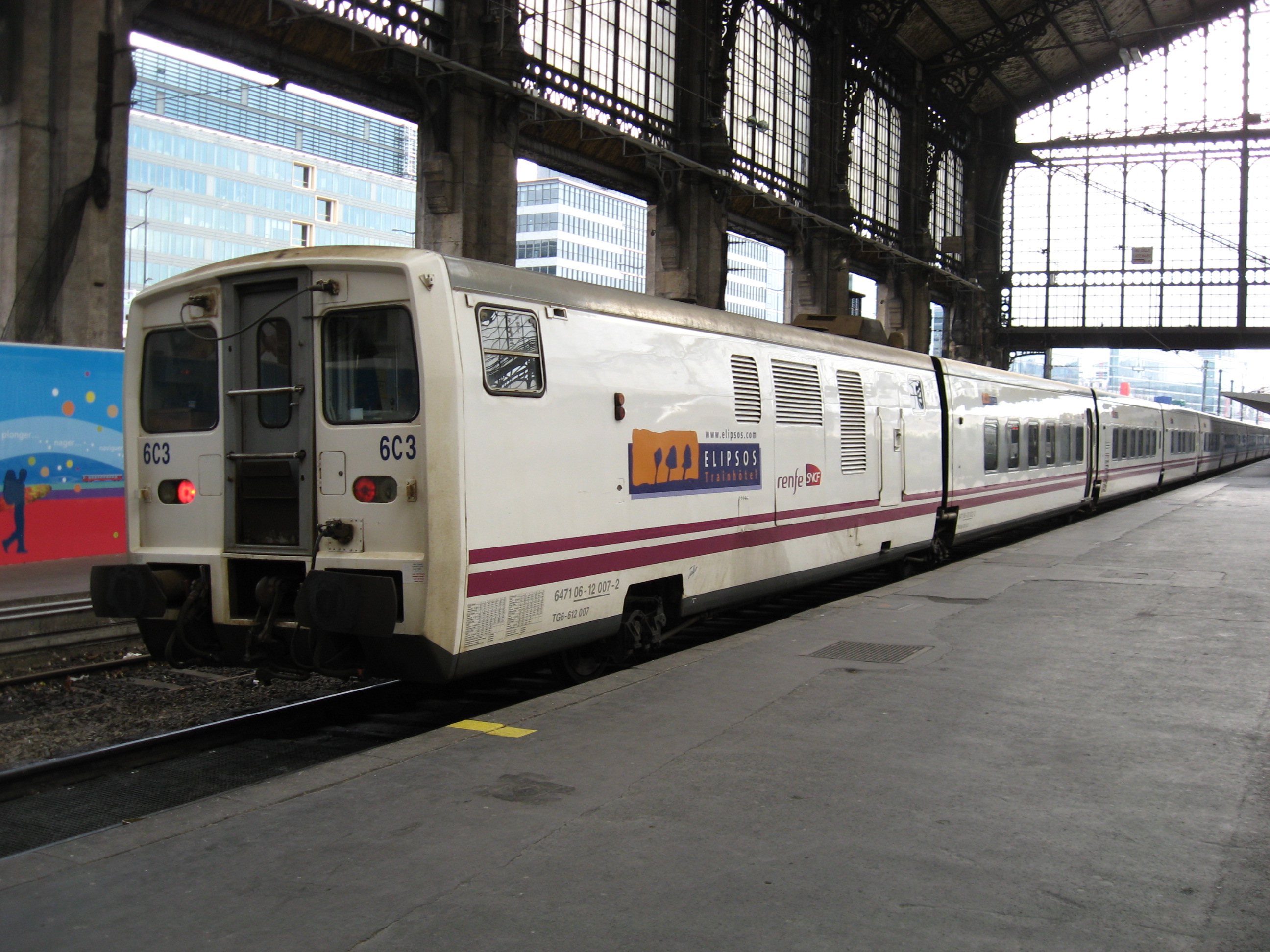 Talgo trein in Paris Austerlitz